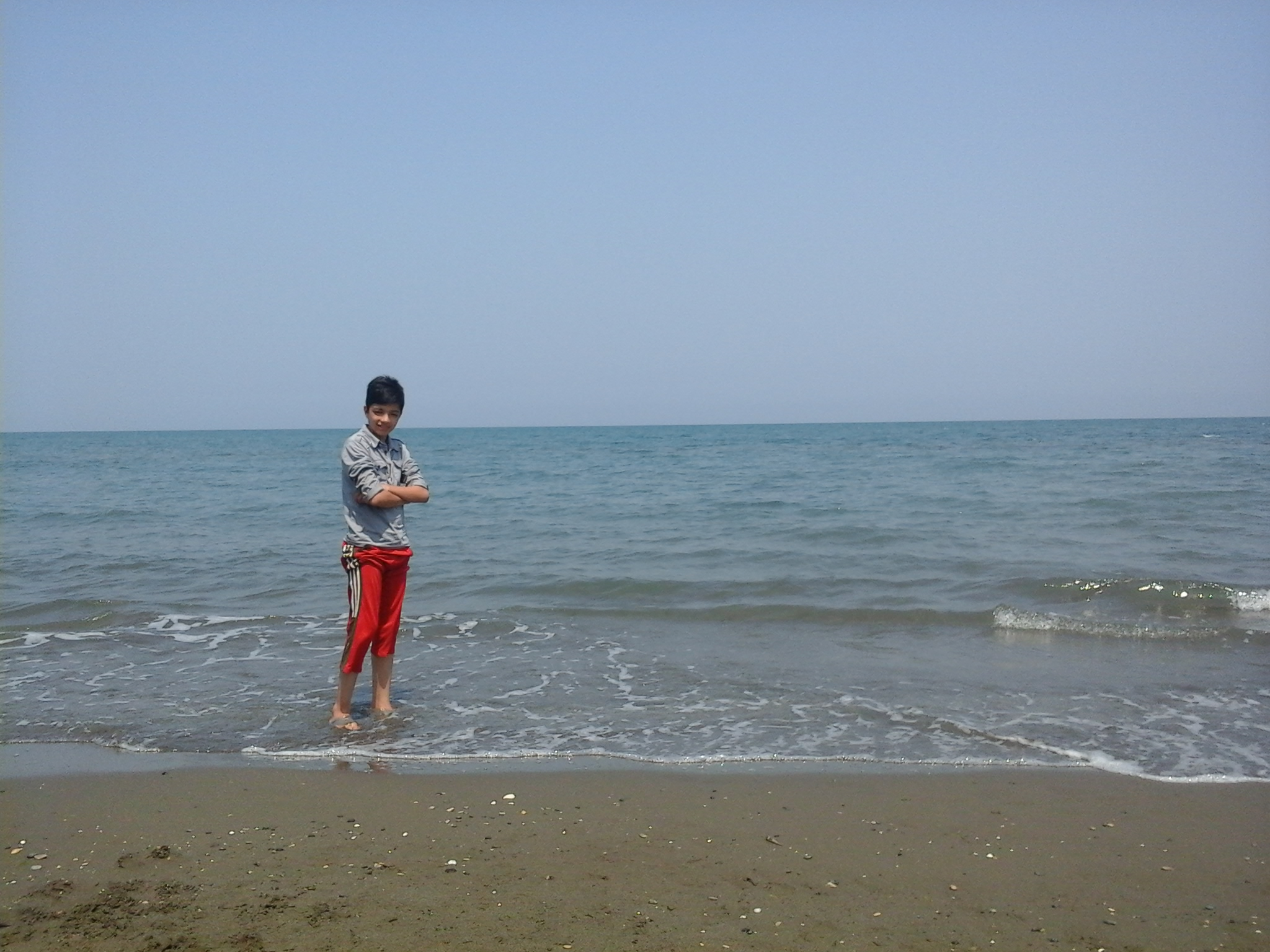 رضا شریفیان